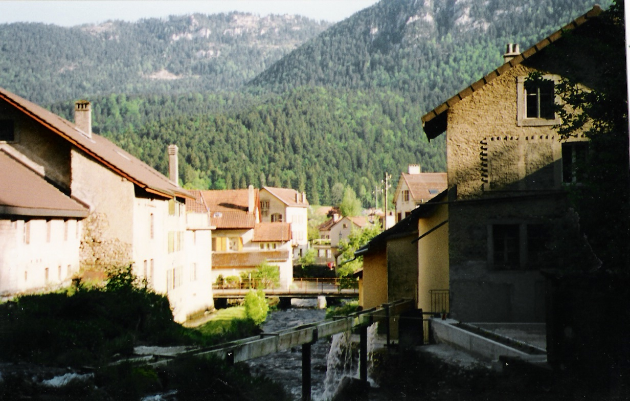 Noiraigue falu patakja Svájcban